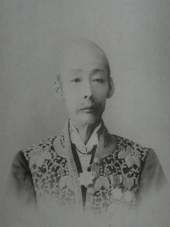 長松幹男爵（1834～1903）